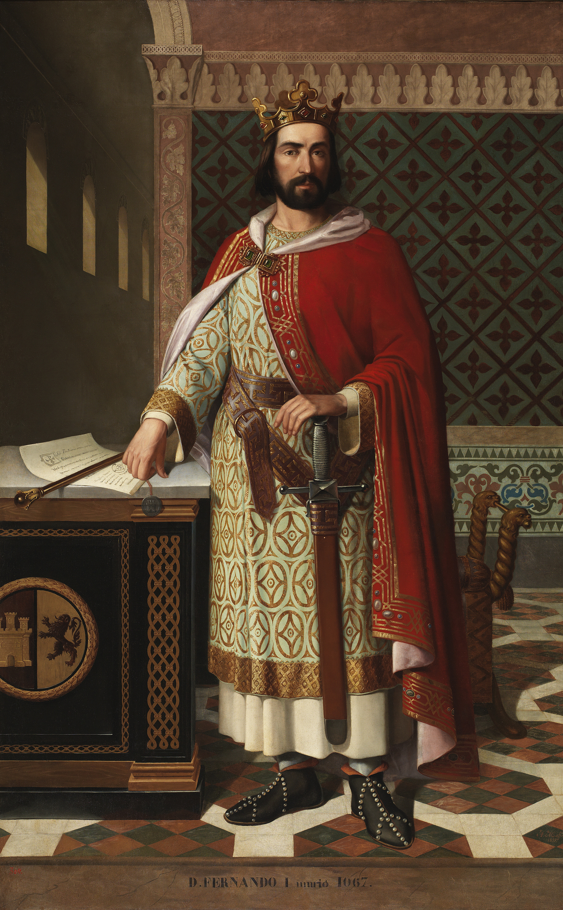 El lienzo representa al rey Fernando I de León (c.1016-1065), hijo de Sancho Garcés III de Pamplona, rey de Pamplona, y de la reina Jimena Fernandez. Impulsó la Reconquista, conquistando las plazas de Lamego (1057), Viseo (1058) y Coímbra (1064), además de someter a varios de los reinos de taifas de la Península Ibérica al pago de parias al reino leonés. Al morir dividió sus reinos entre sus hijos: a su hijo primogénito, Sancho II, le correspondió el reino de Castilla y las parias sobre el reino taifa de Zaragoza. A su segundo hijo, Alfonso VI, le correspondió el reino de León y el título imperial, así como las parias del reino taifa de Toledo. El tercer hijo de Fernando I, Garcia, recibió el es, creado a tal efecto, y las parias de los reinos taifas de Sevilla y Badajoz. A las infantas Urraca y Elvira les correspondieron las ciudades de Zamora y Toro, respectivamente, también con título real y rentas propias.